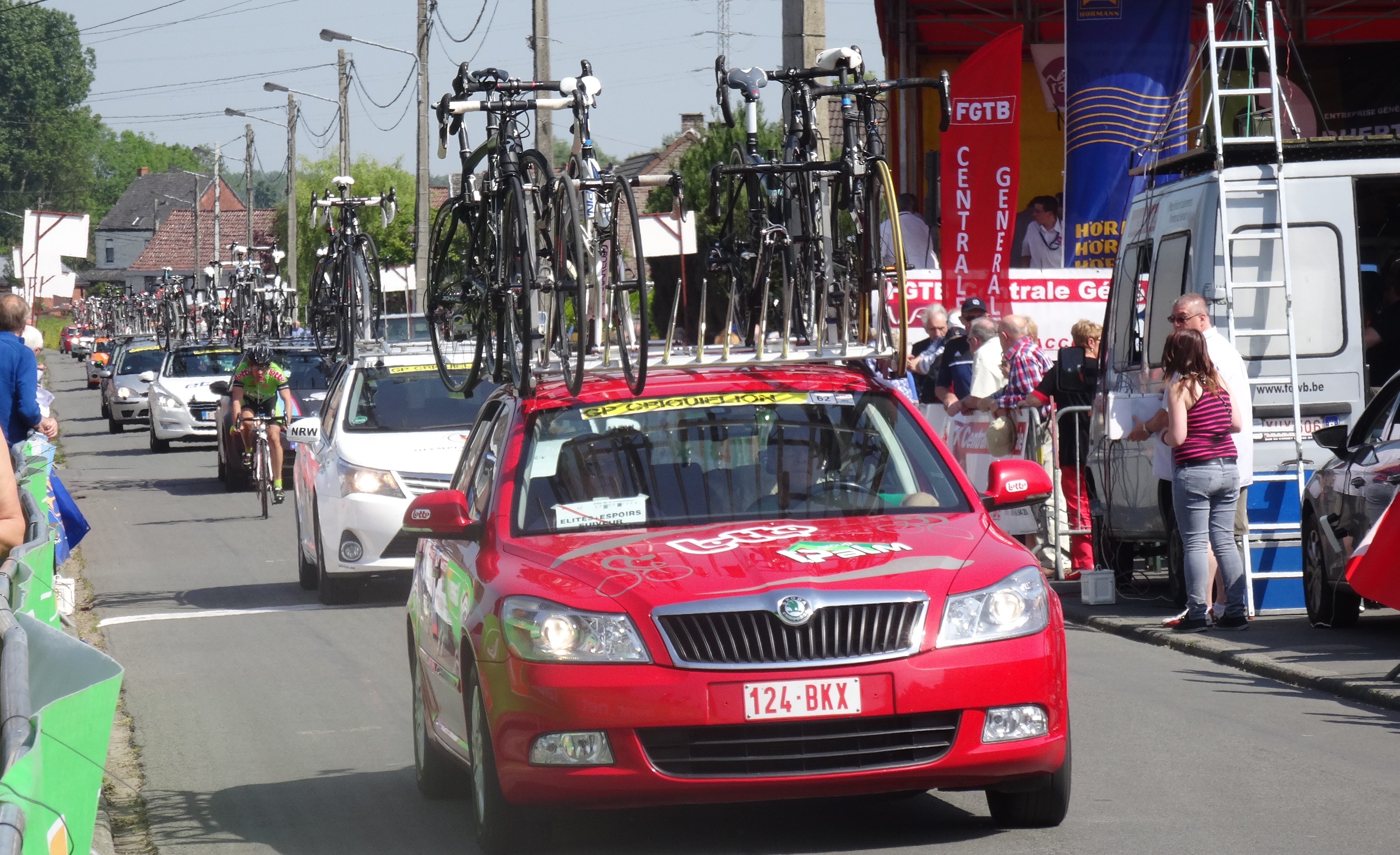 Grand Prix Criquielion 2014, Deux-Acren. Depicted person: Sébastien Sciascia